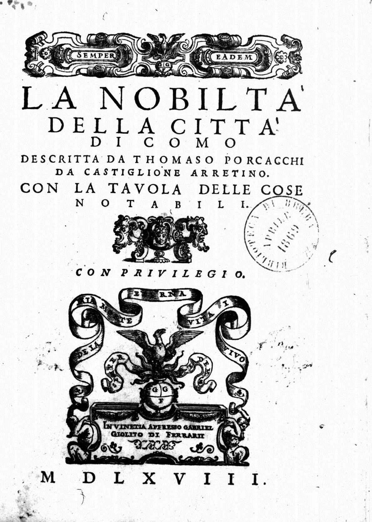 Frontespizio